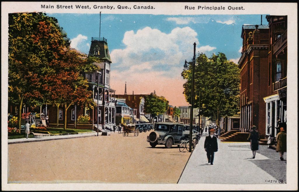 Rue principale Ouest, Granby, carte postale, Valentine-Black Co.